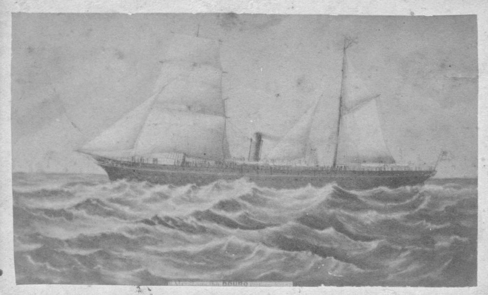 Corveta "Parnahyba", utilizada na Expedição Científica do Dr. Luiz Cruls.